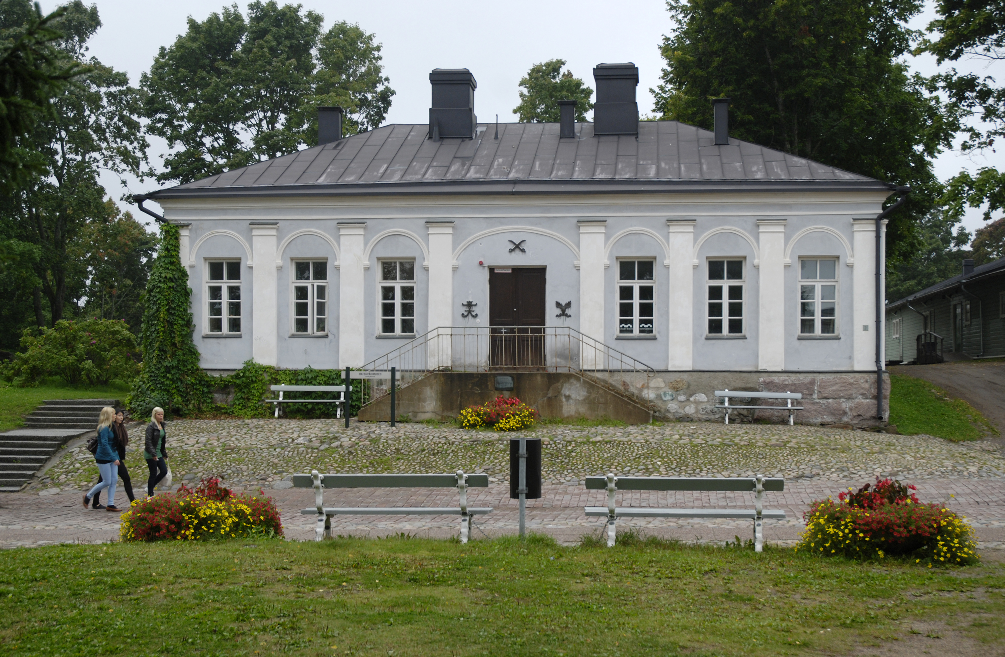 Ratsuväkimuseo. Lappeenrannan museot, Seppo Pelkonen.